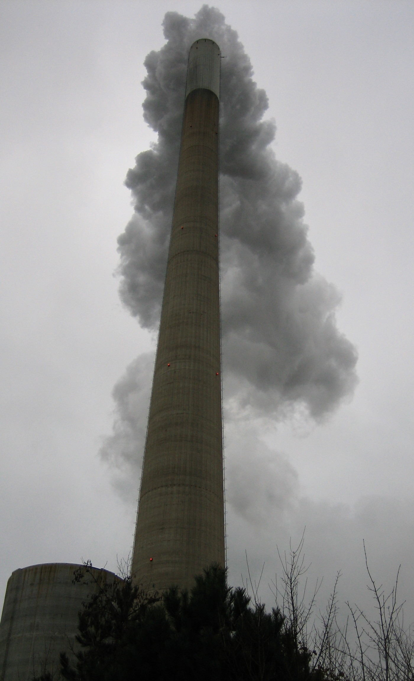 Schornstein des Kohlekraftwerks in Mehrum, Landkreis Peine